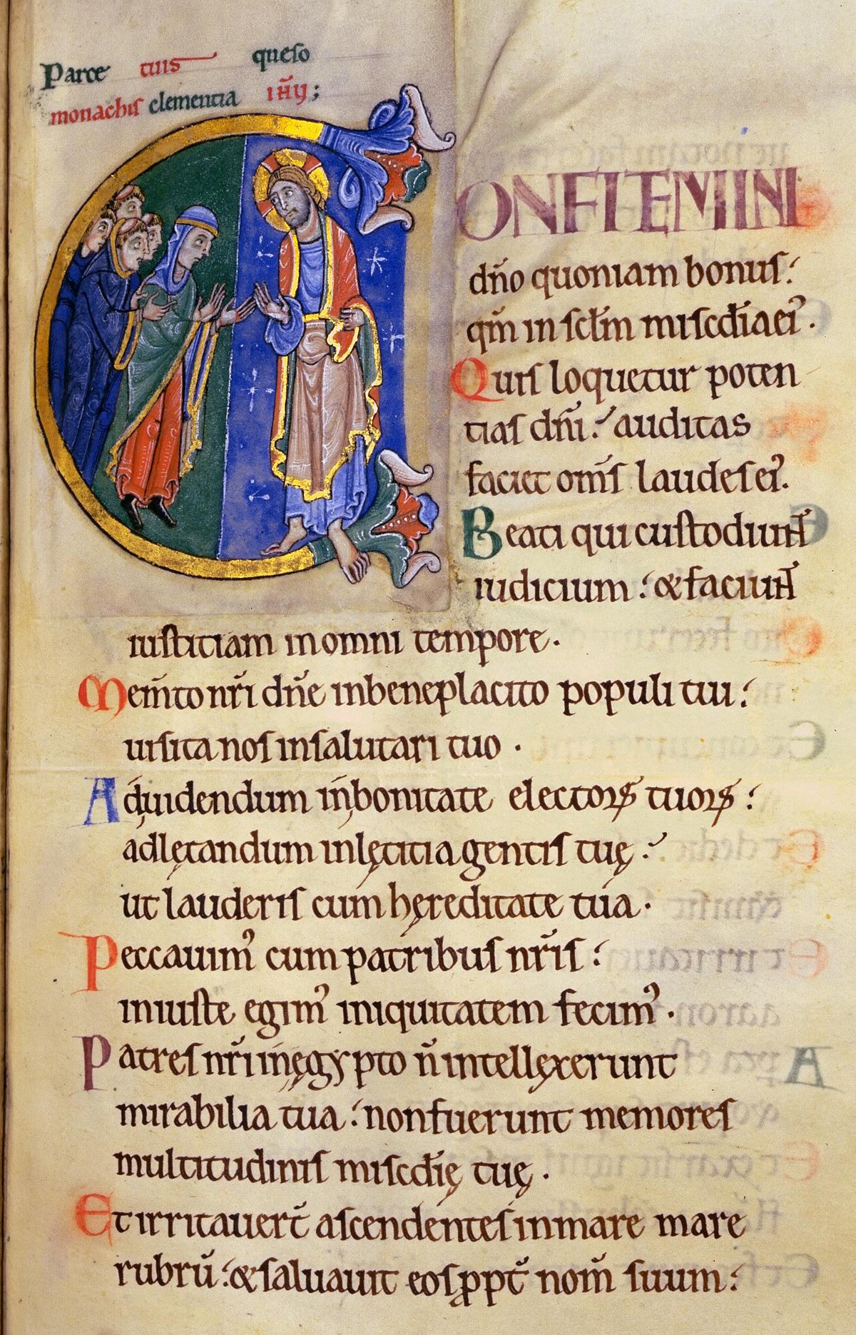 Initial C aus Psalm 105. In: Albani-Psalter